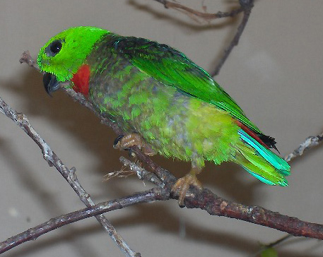 Species Loriculus galgulus Family Psittacidae